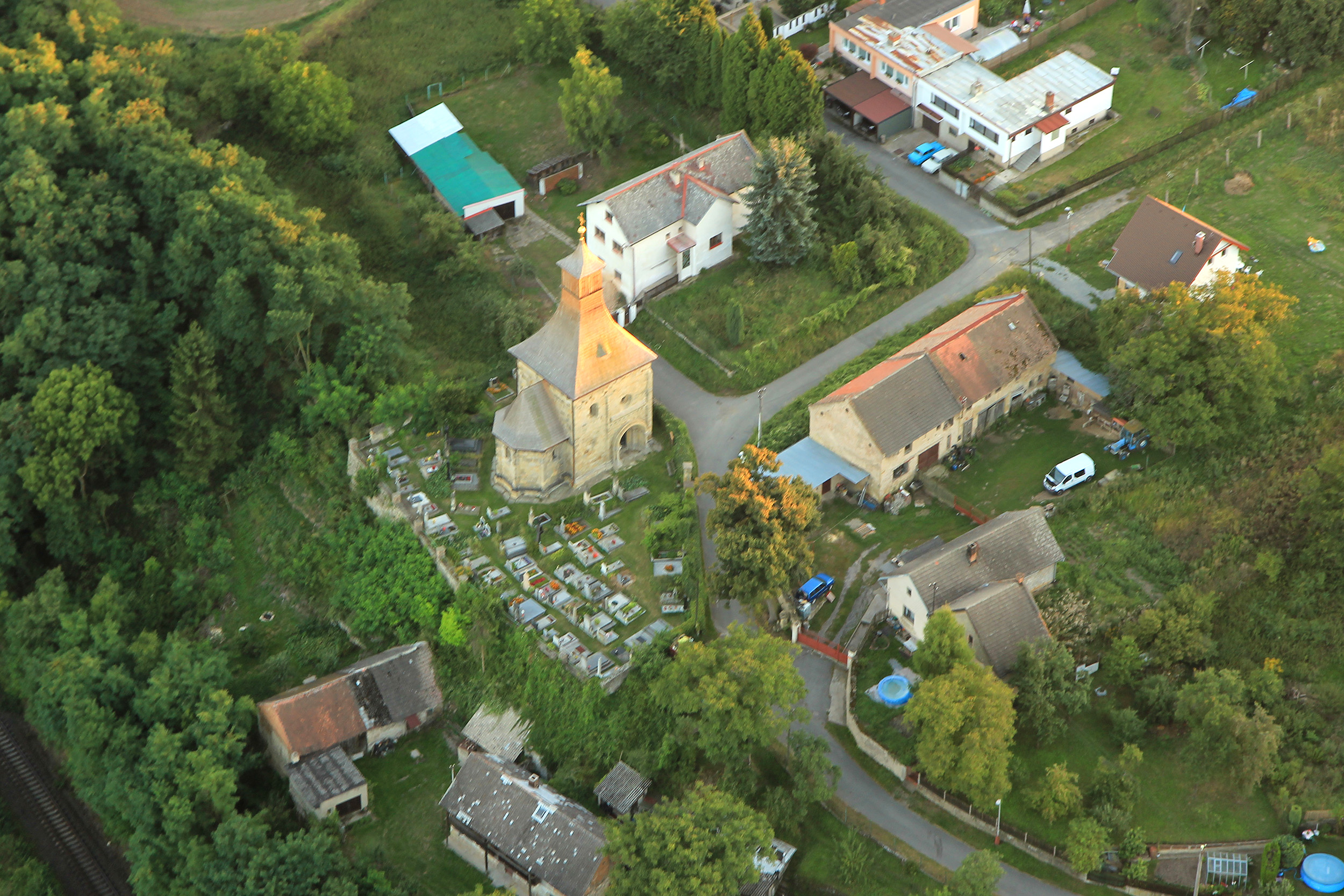 Kostel sv. Mikuláše (Vinec), J část vsi, Vinec